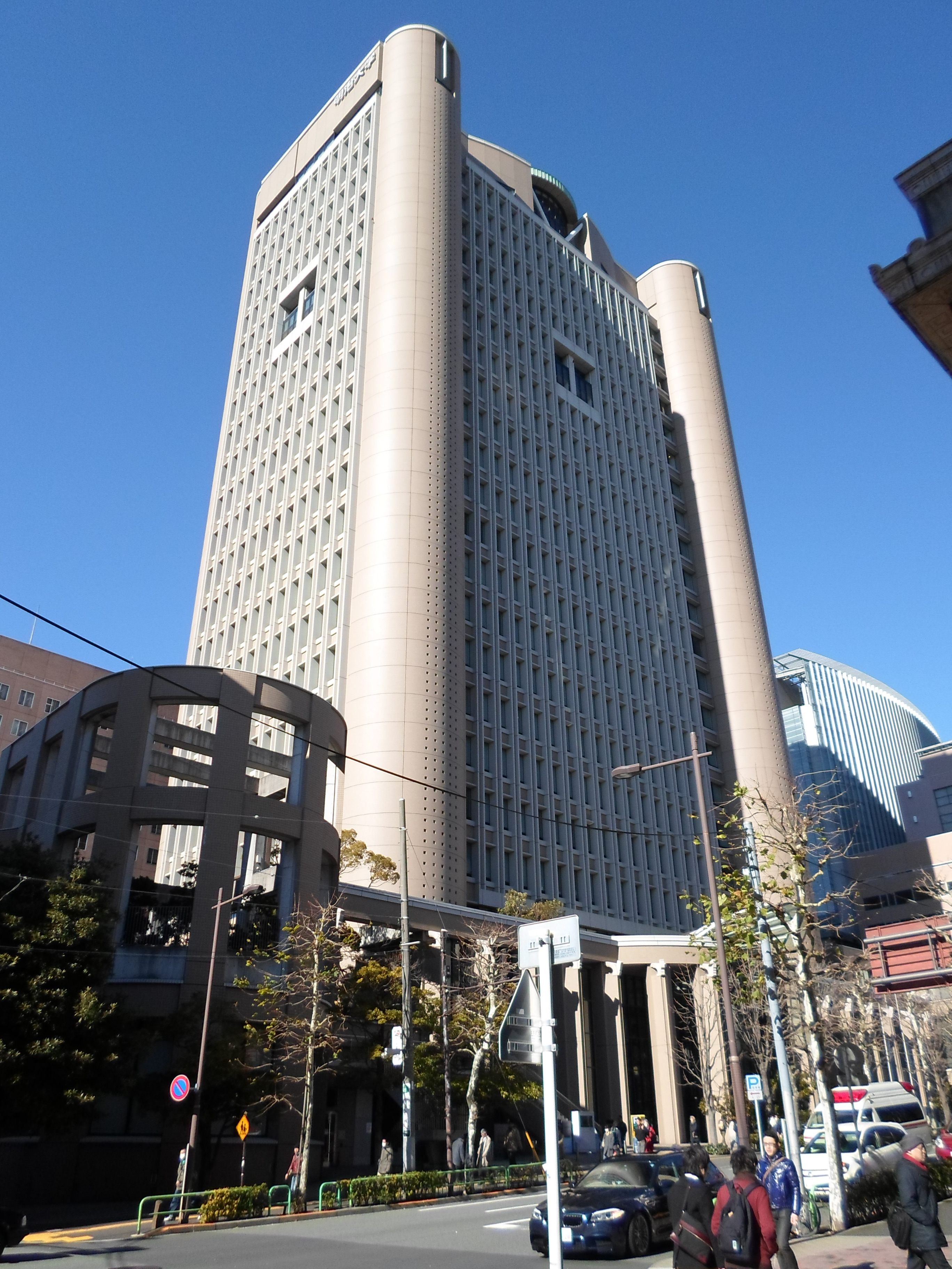 中文（中国大陆）: 明治大学骏河台校区。日本，东京，神田。